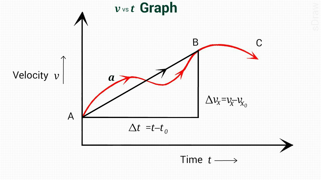 লেখের যে অংশ ভূমির সমান্তরাল সেখানে বেগের পরিবর্তন শূন্য